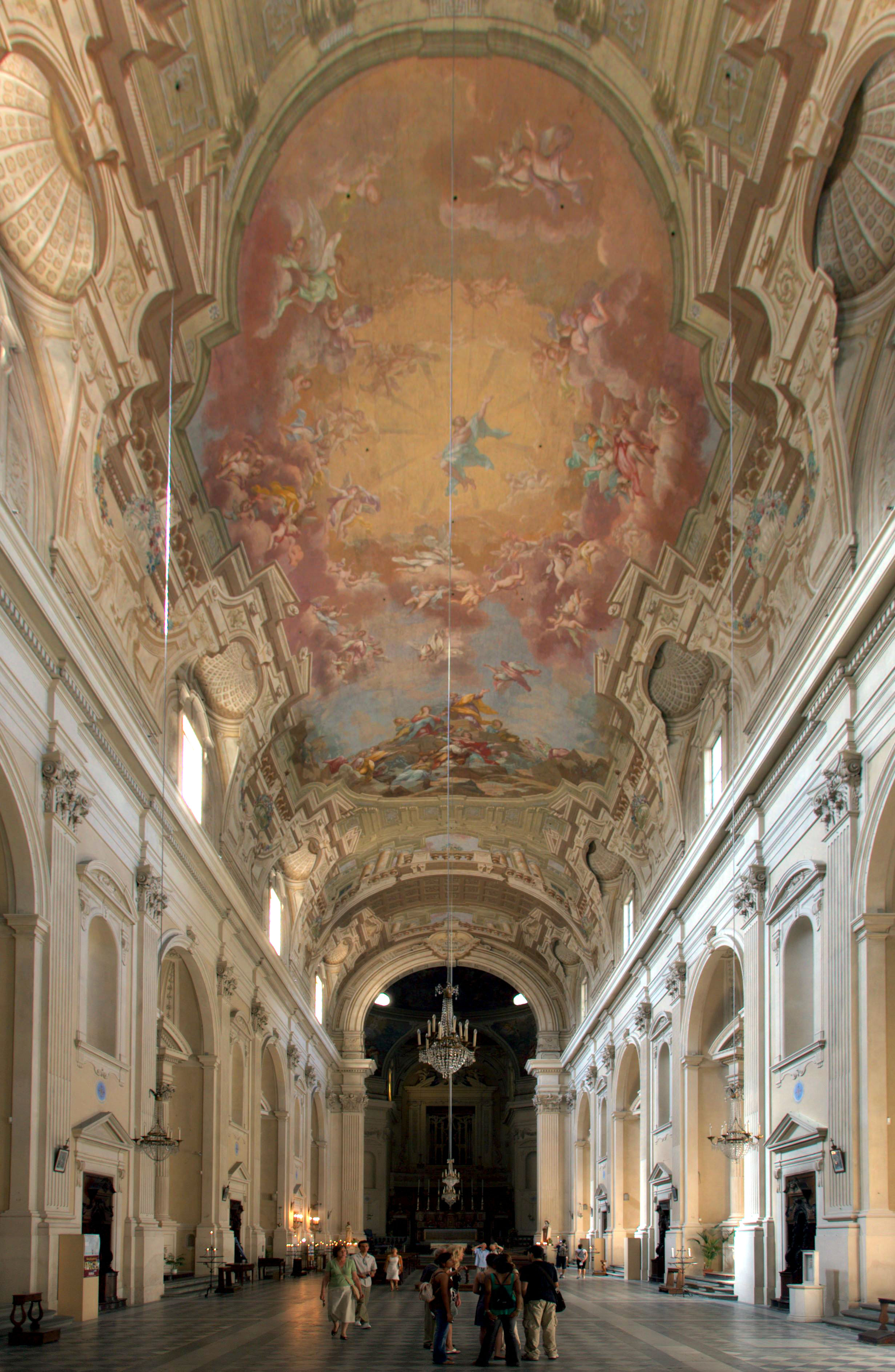 Firenze, Chiesa di Santa Maria del Carmine